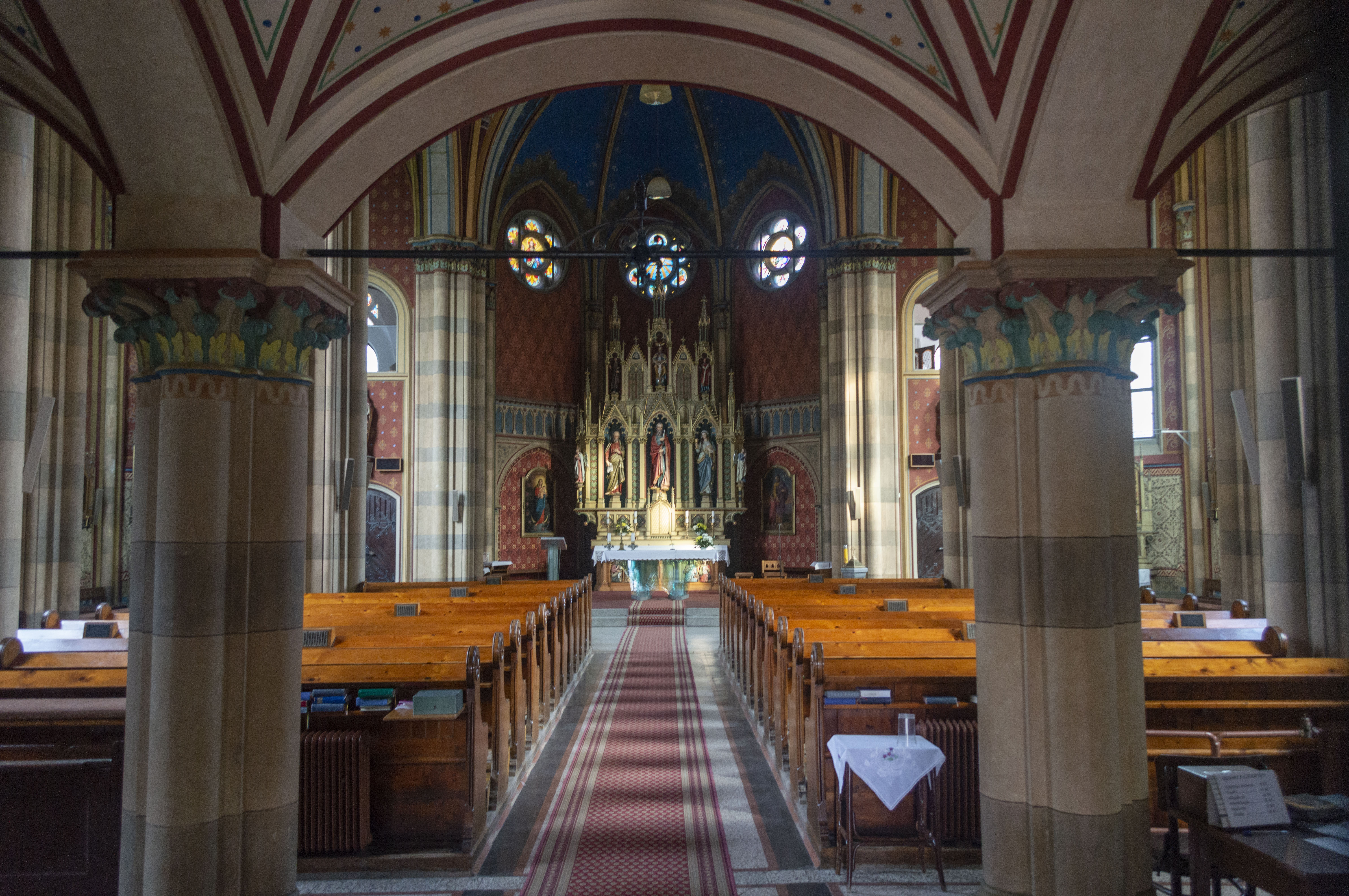 Neogotický kostel svatého Bartoloměje v Kopřivnici.